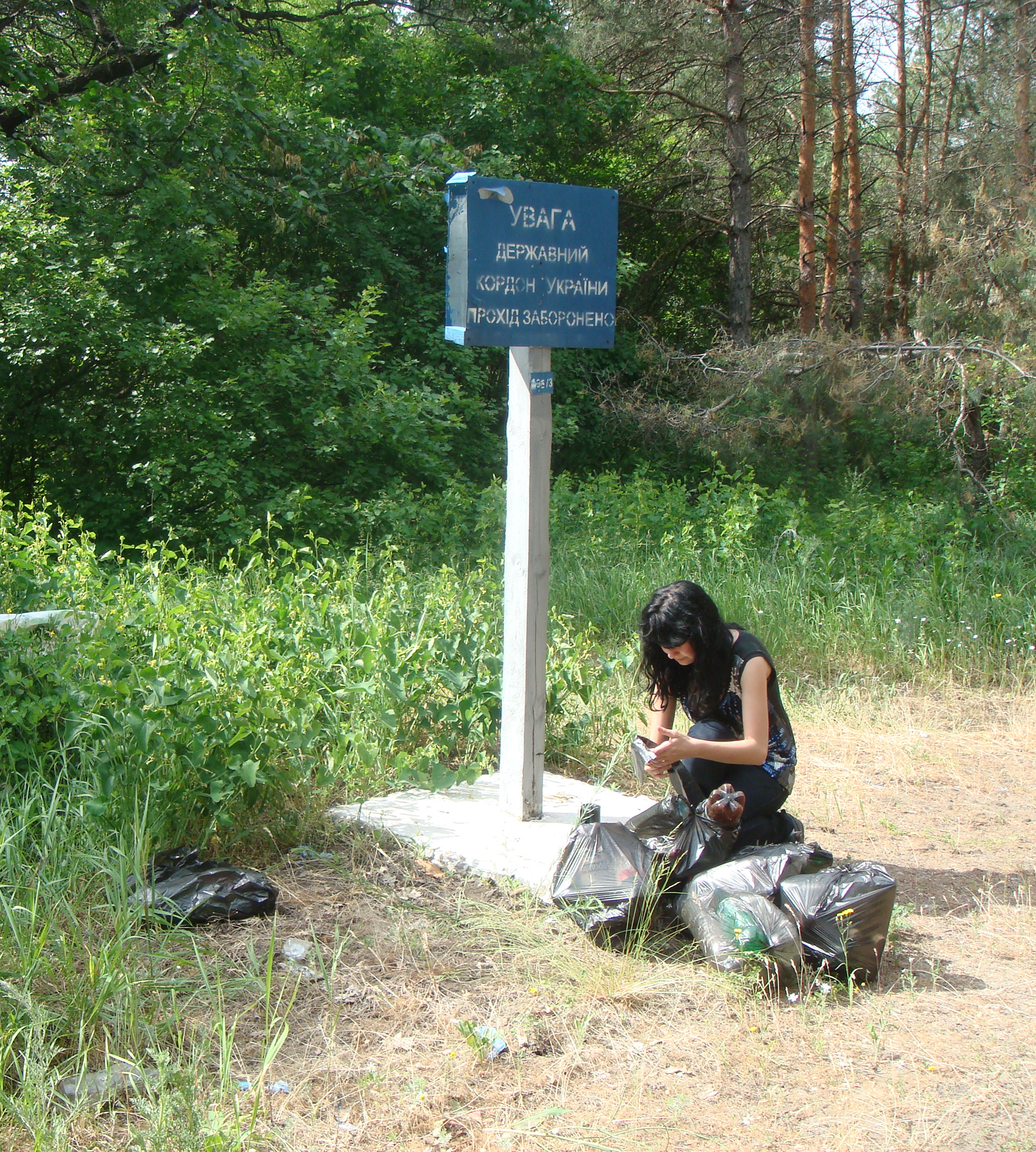 На російсько-українському кордоні біля біостанції Ново-Іллєнко (студенти проводять екоакцію).